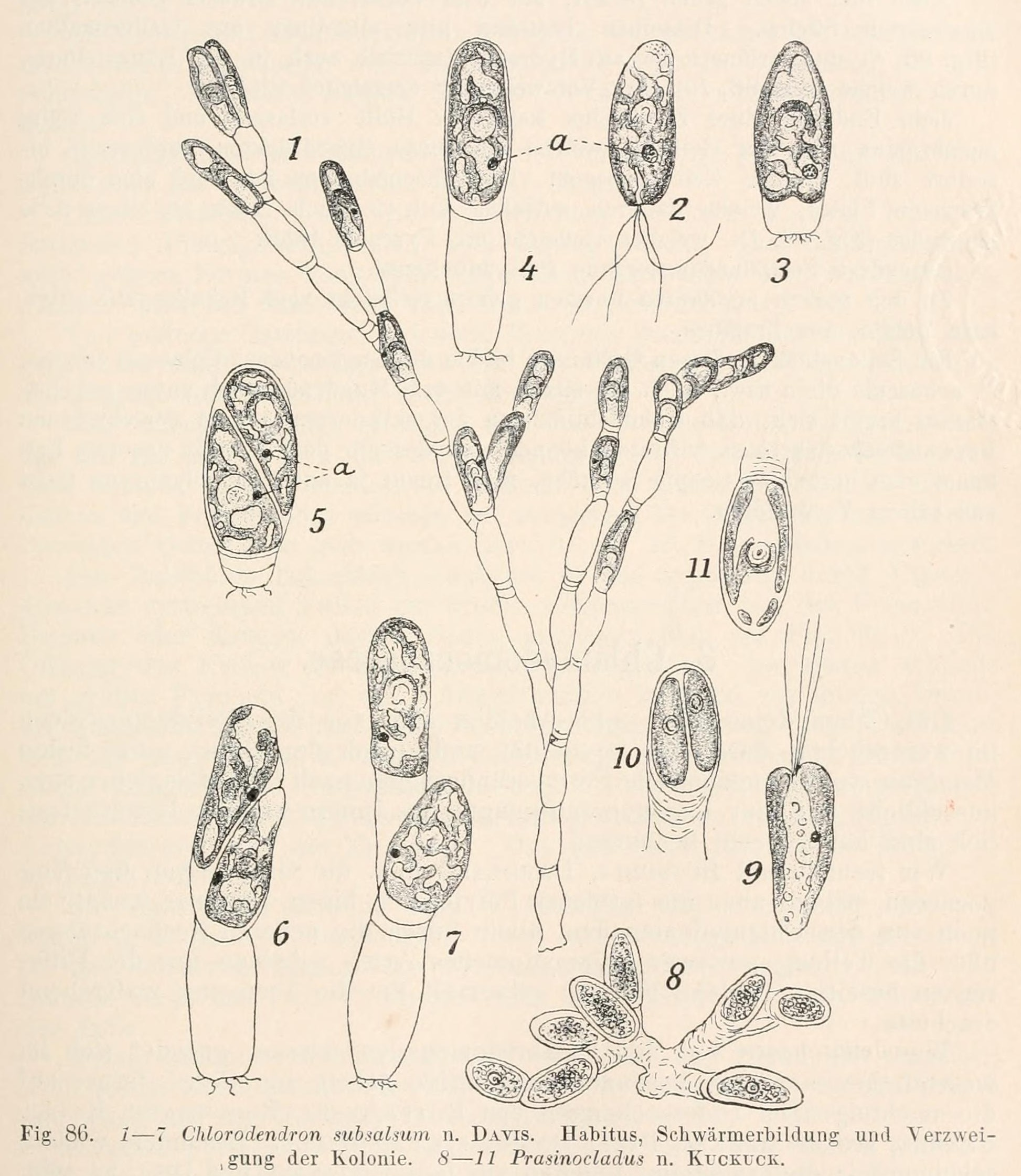 1-7. Chlorodendron subsalsum (B.Davis) Oltmanns = Prasinocladus lubricus f. subsalsa Zimmermann 8-11. Prasinocladus lubricus Kuckuck